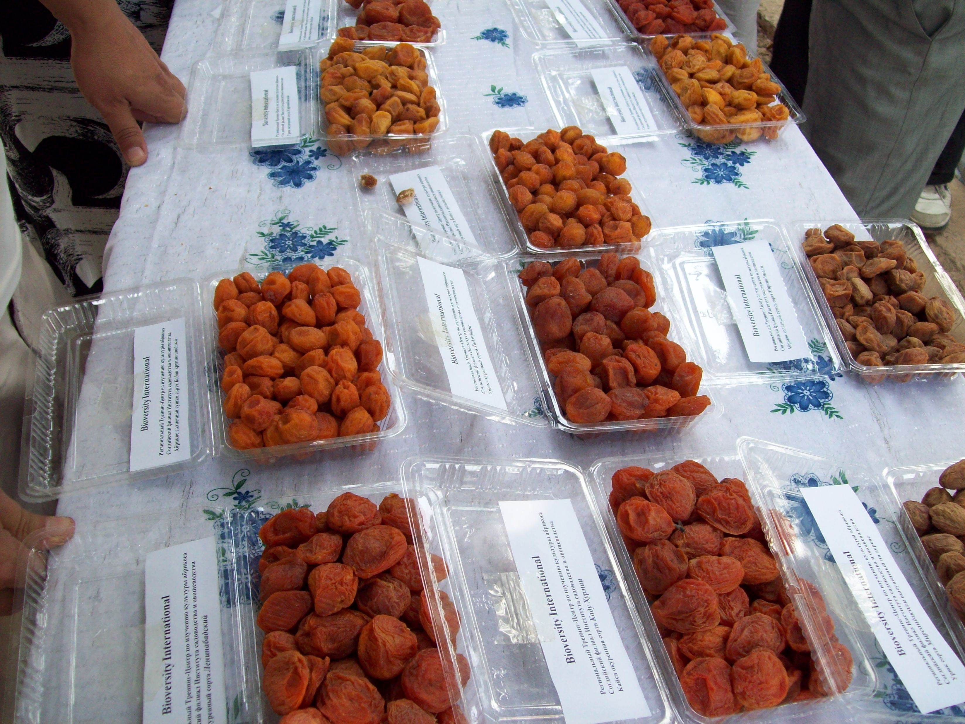 Сухофрукты - являются ценнейшими пищевыми продуктами и заменителями сахара в Центрально-азиатских республиках.